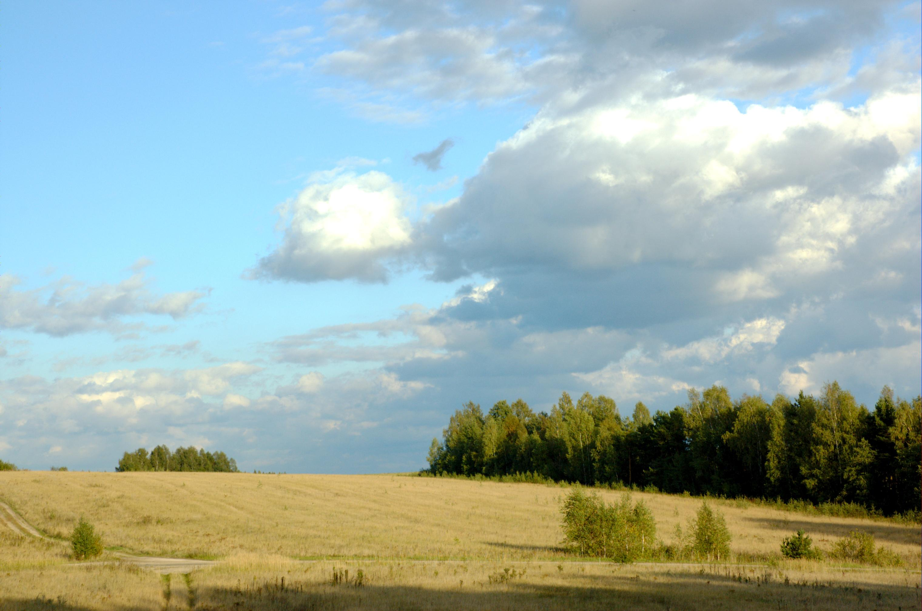 Природа в Рушинове